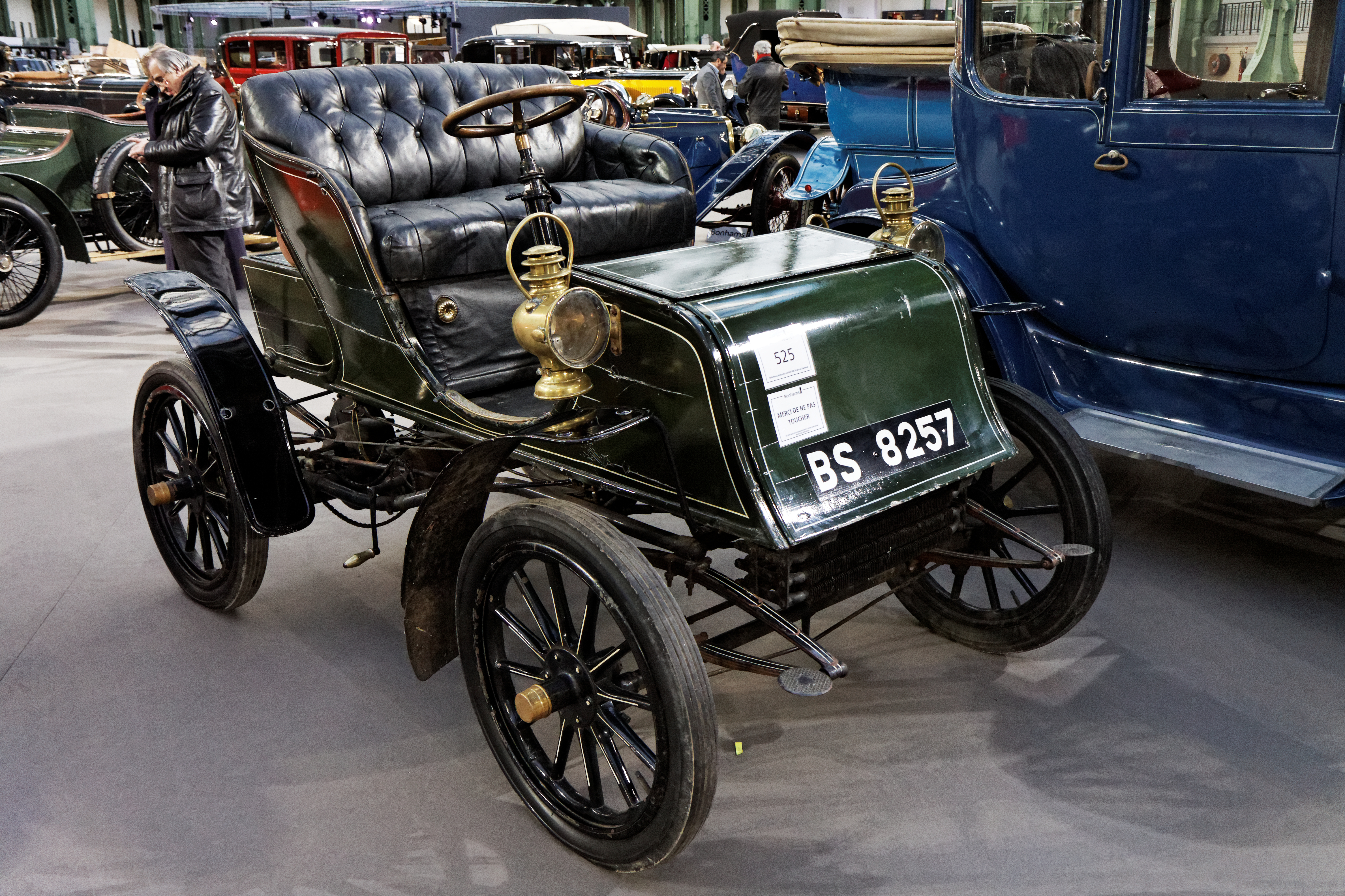 Une Pierce Motorette modèle 8M 2-4 places Stanhope de 1904.